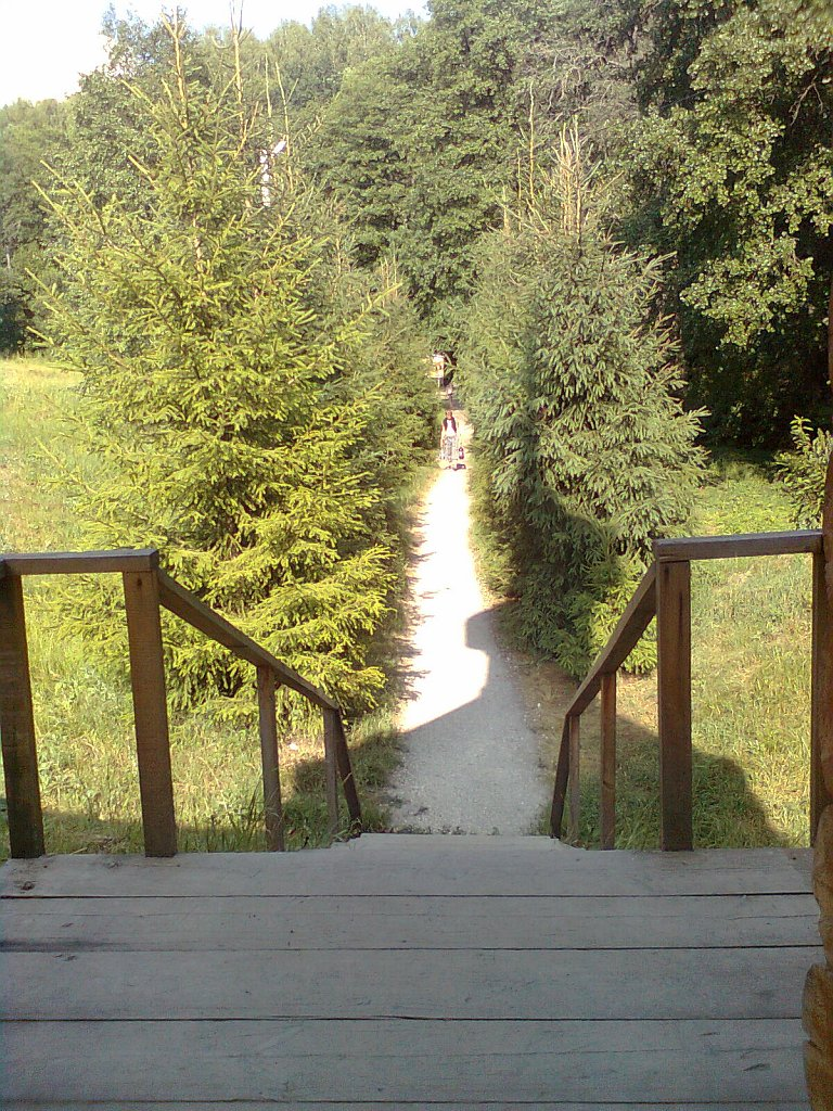 Тропинка к источникам Салолейка, в Пензенской области, близ города Нижний Ломов.